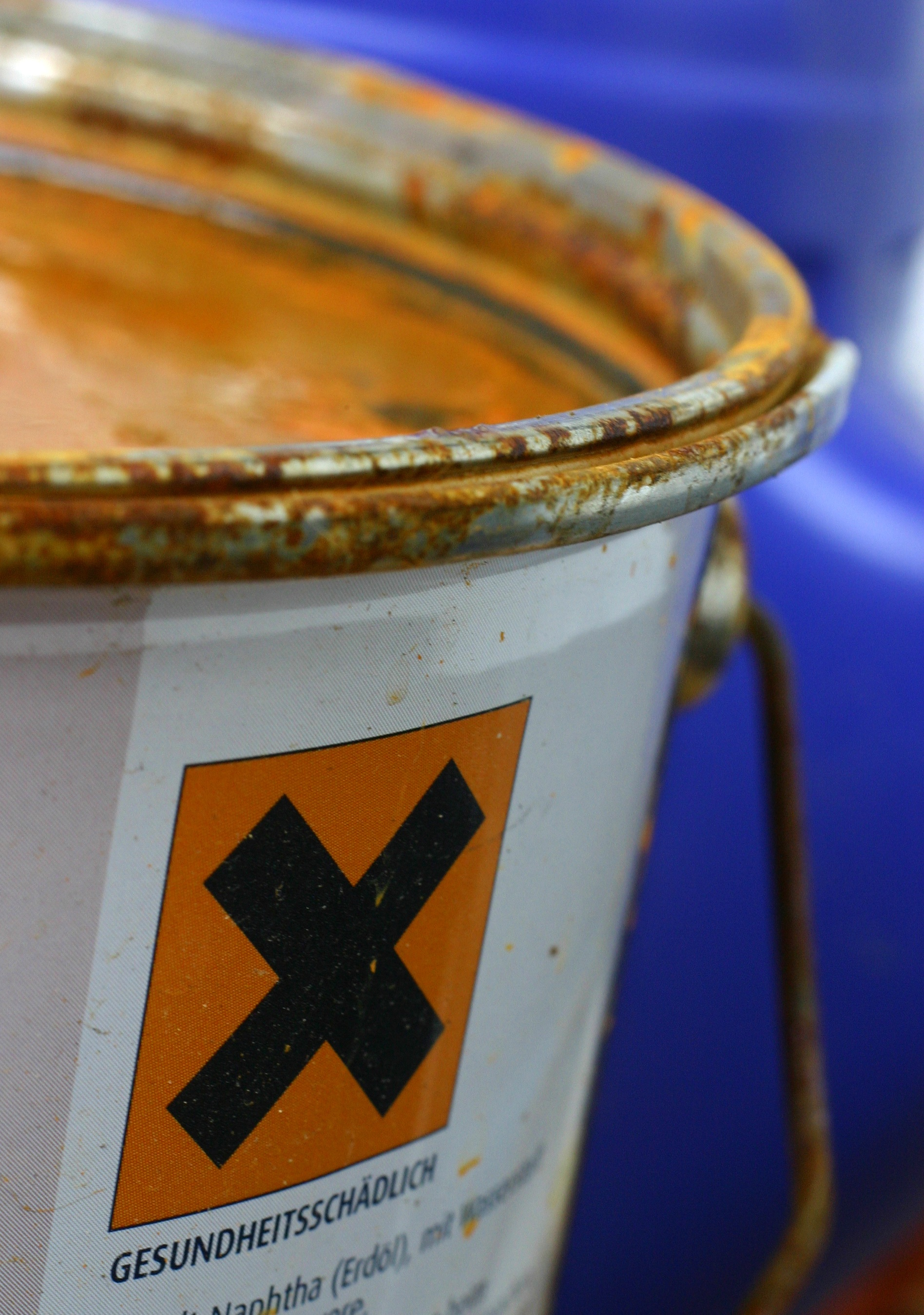 Chemikalie, Warnhinweis, Giftstoffe, Farbe, Industrie